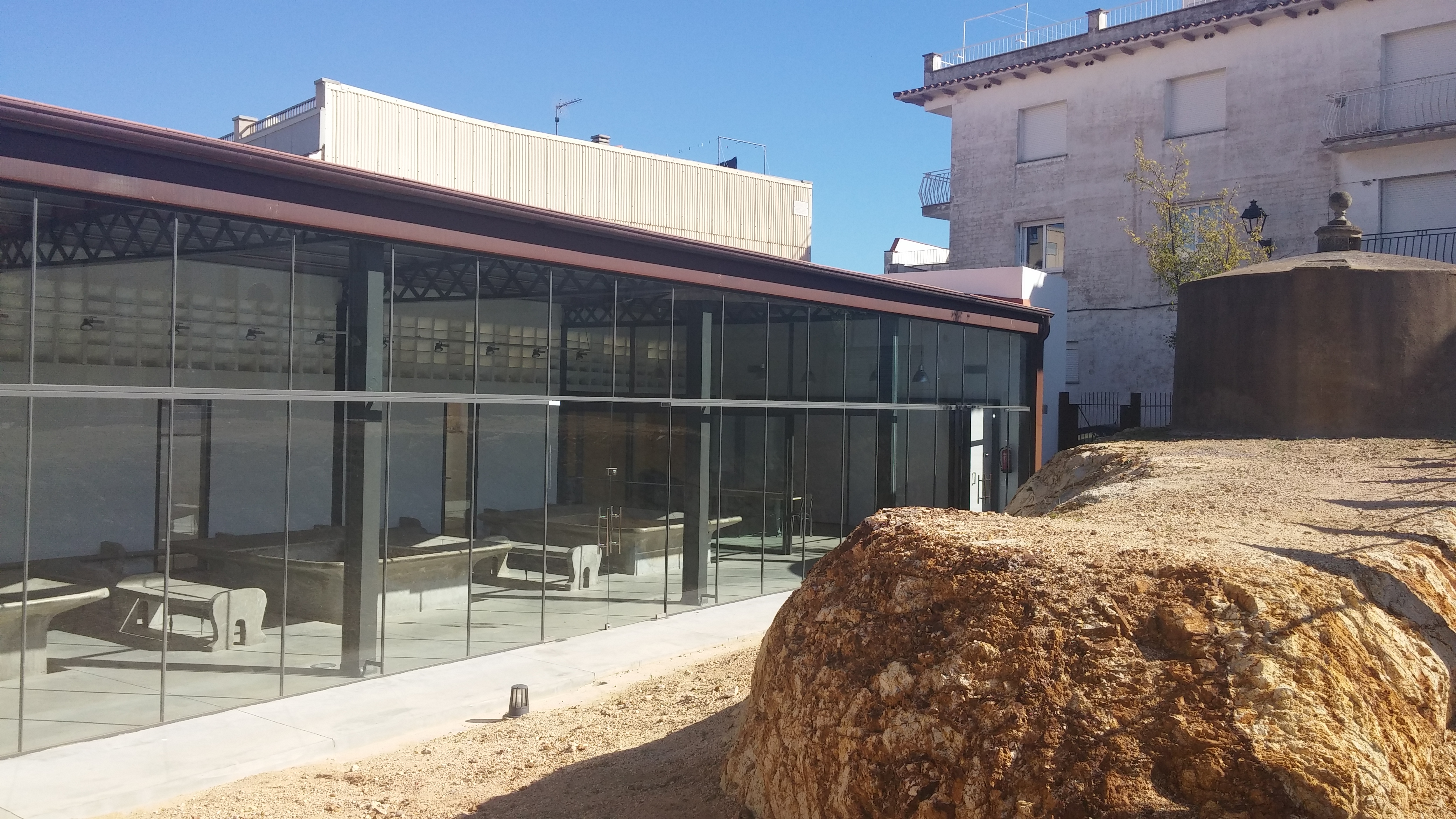 Safareigs del Puig. Sant Feliu de Guíxols